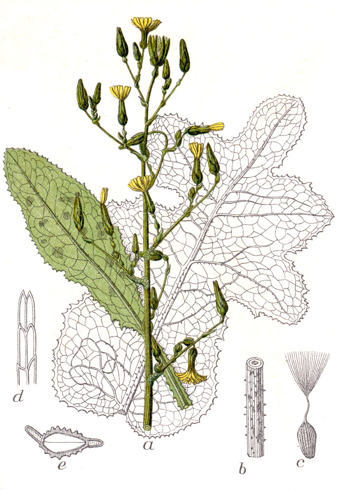 Lactuca virosa L. Original Caption Gift-Lattich, Lactuca virosa